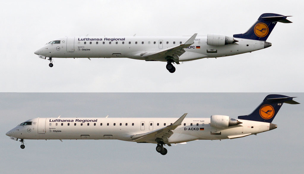 Vergelijking tussen Bombardier CRJ700 "Espelkamp" (boven) en CRJ900 "Wittlich".